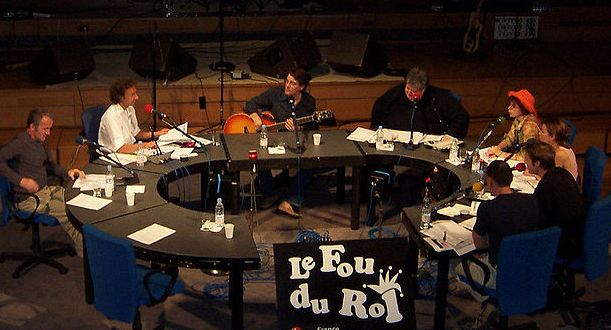 L'émission de radio Le fou du roi animée par Stéphane Bern sur France Inter en février 2003, avec pour invité l'auteur-compositeur-interprète Francis Cabrel. De gauche à droite : Vincent Roca, Stéphane Bern, Francis Cabrel et Guy Carlier